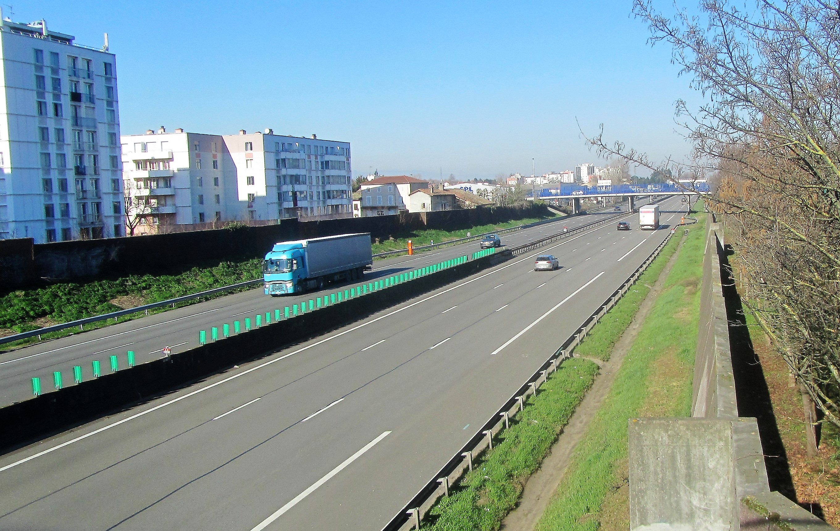 Autoroute A 6